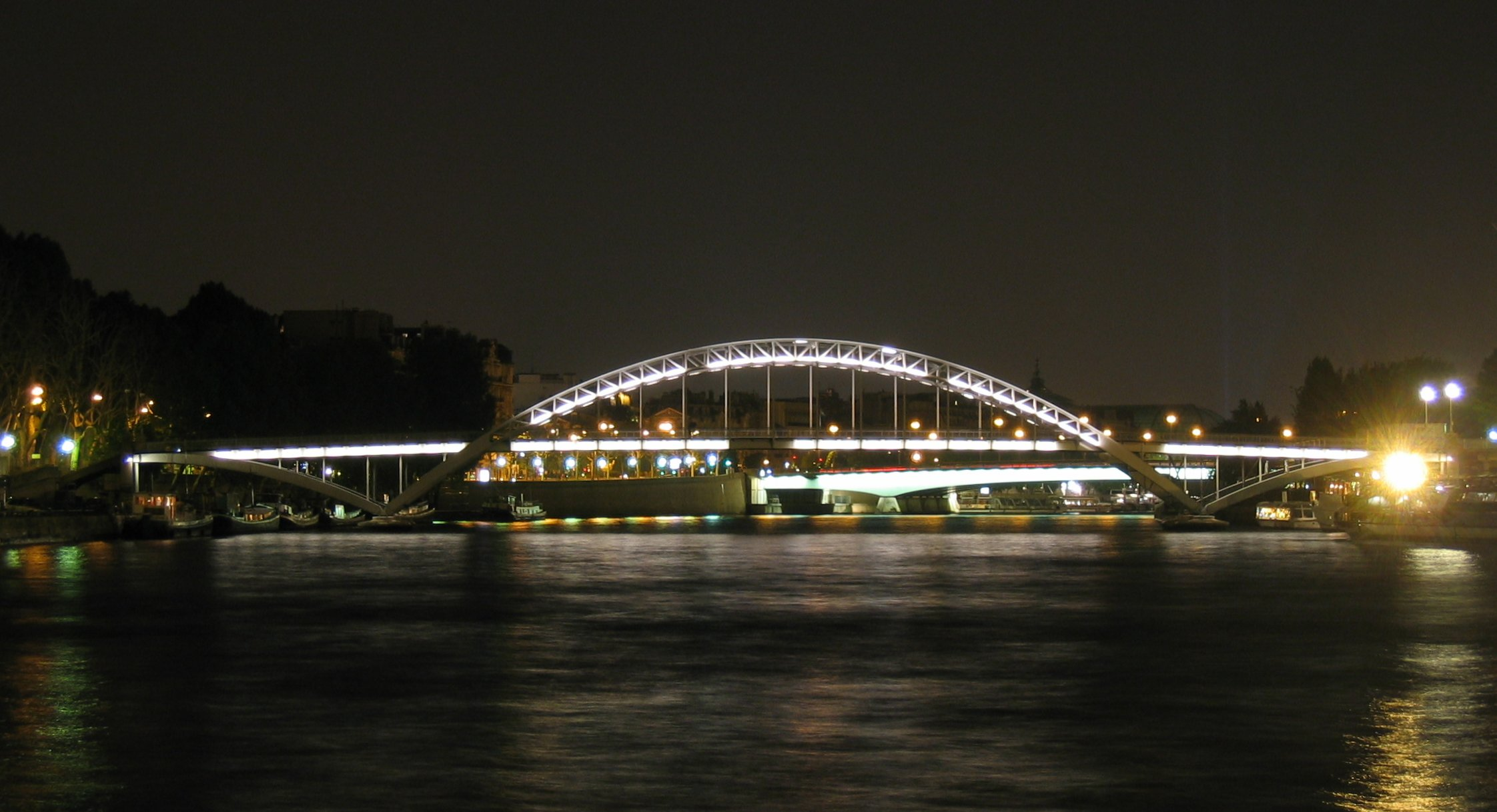 Photo de nuit de la Passerelle Debilly